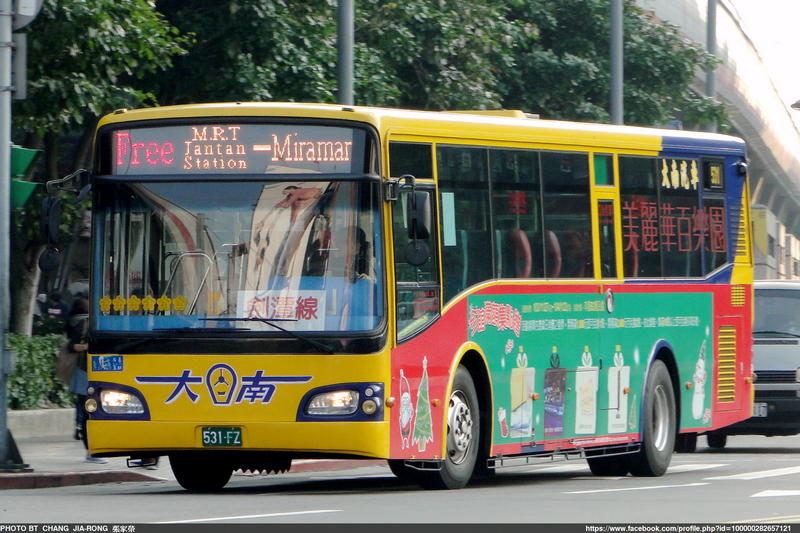 大南汽車2012年日野RK8JRSA大客車531-FZ，行駛美麗華百樂園免費接駁車劍潭線。